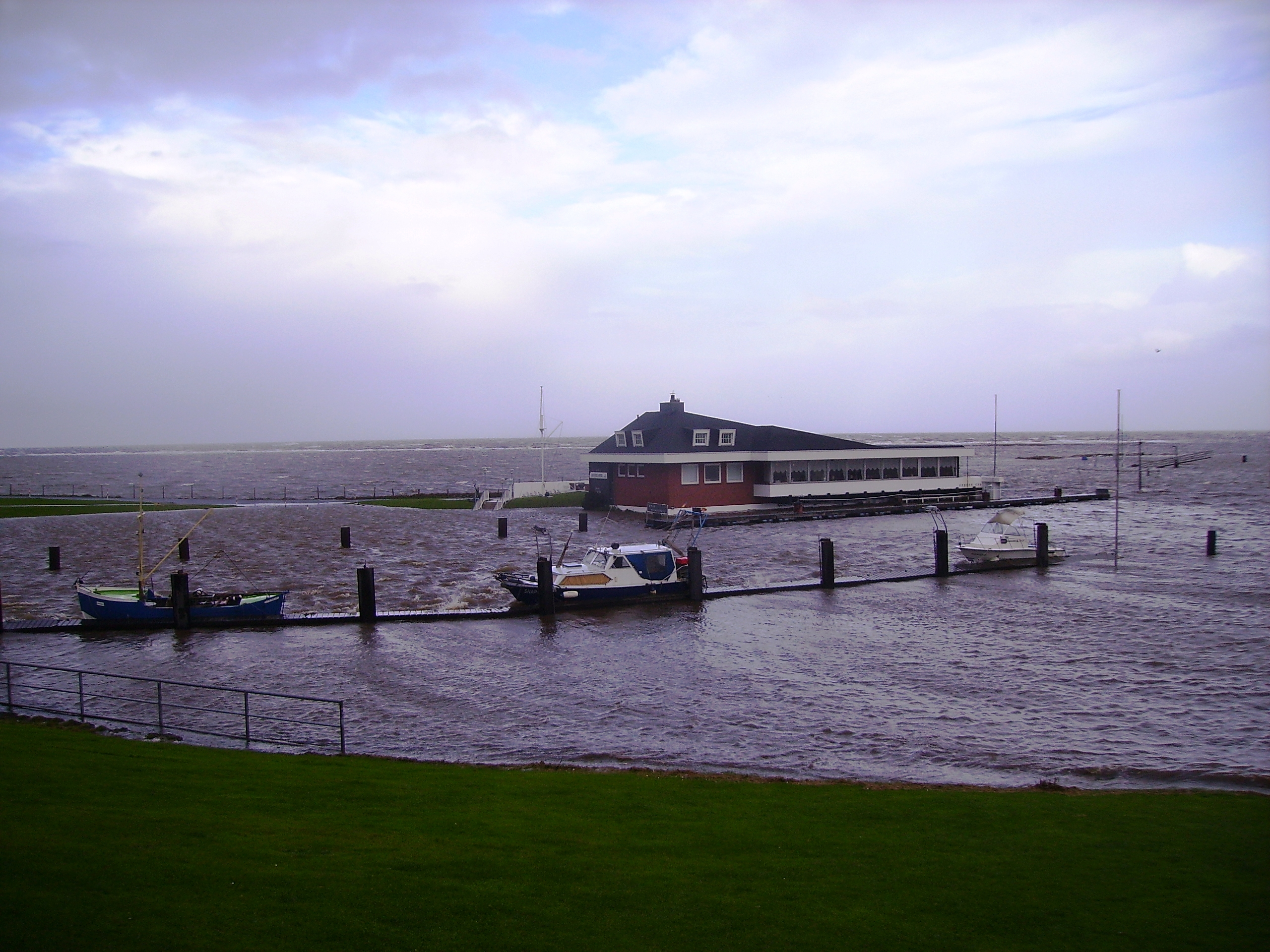 Elbterassen in Otterndorf bei Sturmflut.